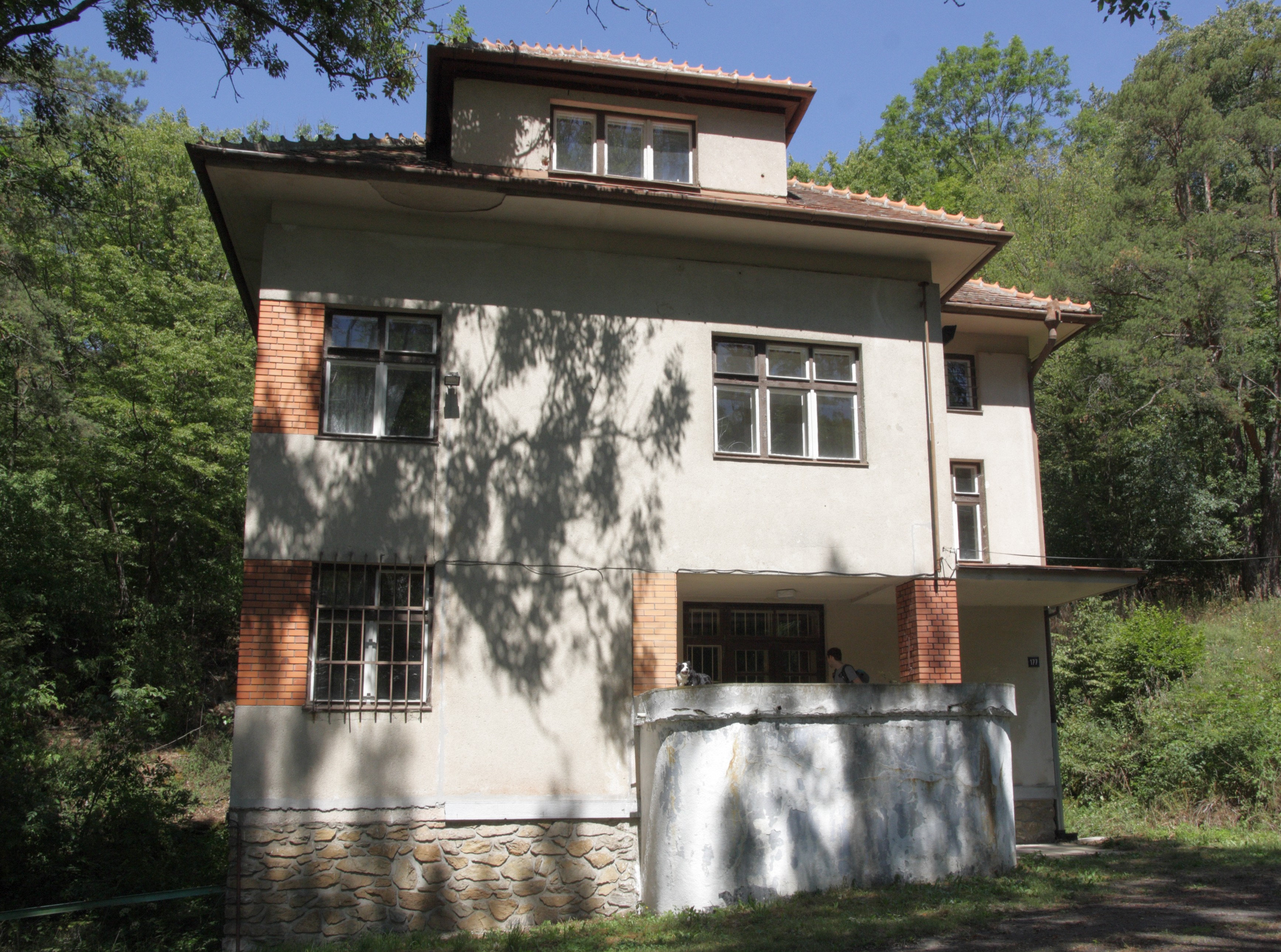 Čížov (Horní Břečkov) - budova celního úřadu u Hardeggského mostu, č.p. 177.